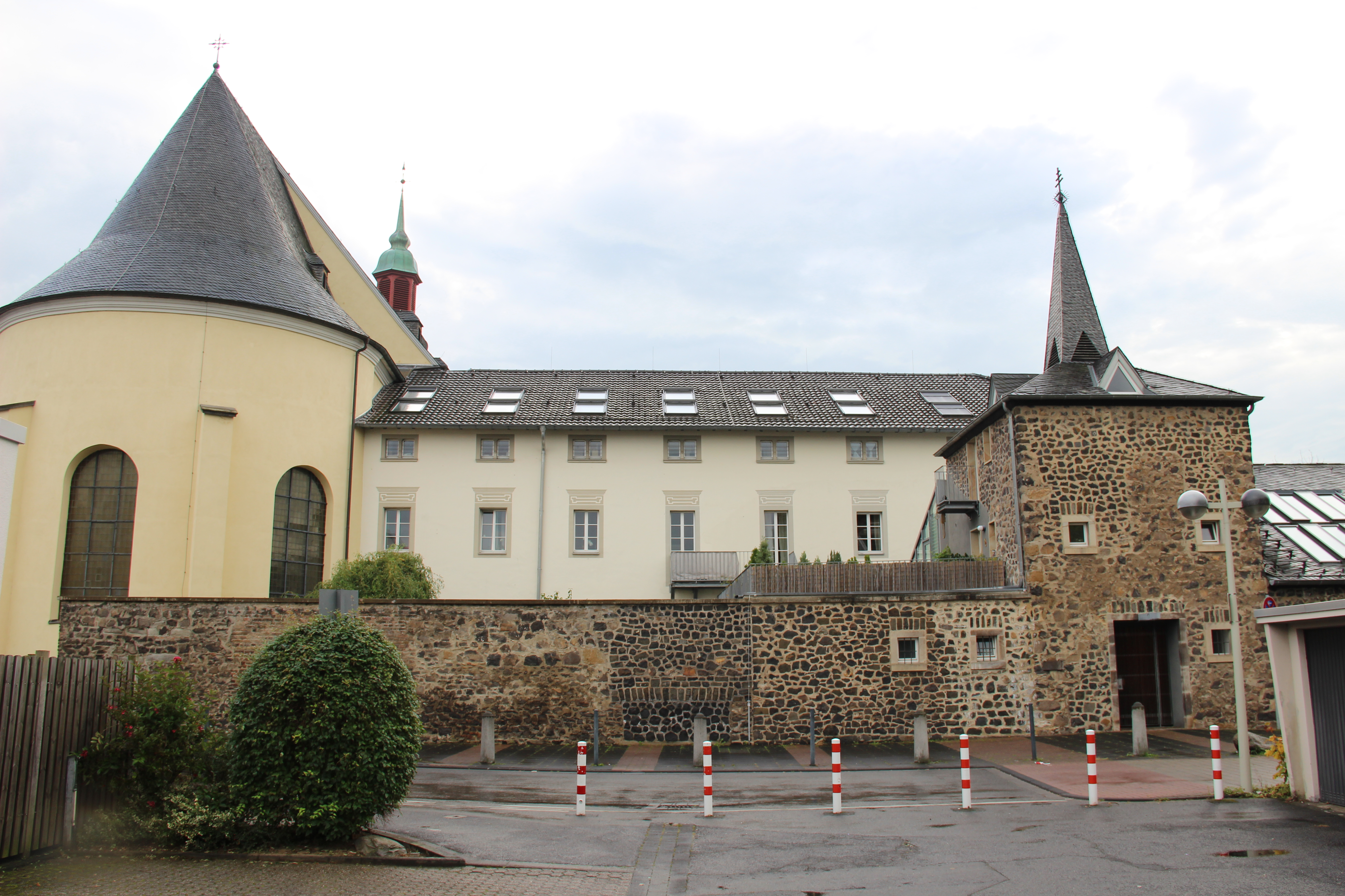 Ehemalige Klosteranlage „Karmel Sankt Joseph“, Karmeliterstraße 1/1d/1e, Bonn-Pützchen